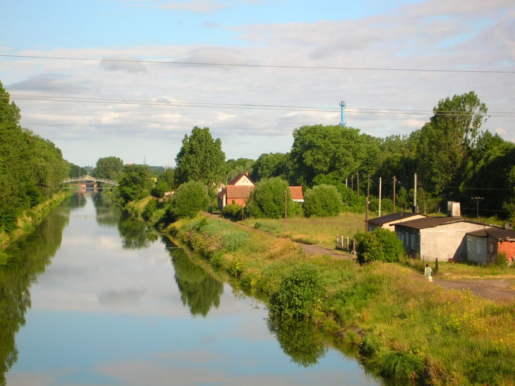 Kanał Bydgoski na os. Flisy w Bydgoszczy